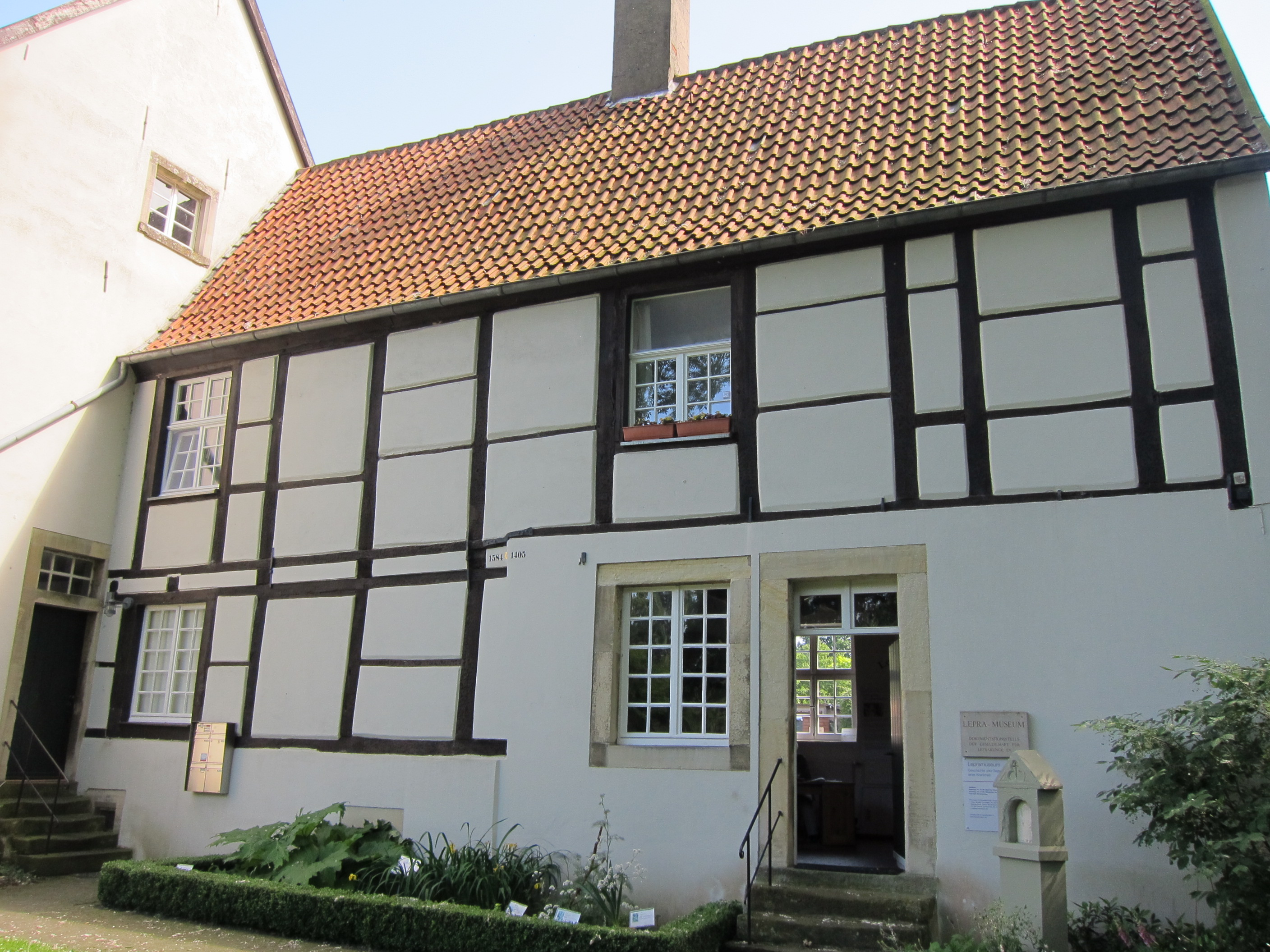 Das Lepramuseum (sowie das Kunstwerk "Goldene Fuge") in Münster-Kinderhaus